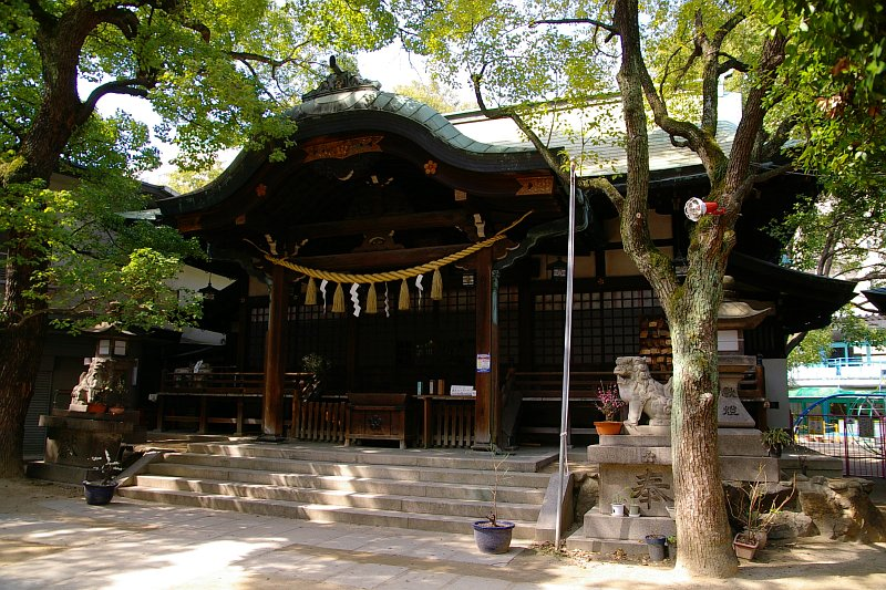 Fukushima Tenmangu (shrine) main building, Osaka City, Japan.